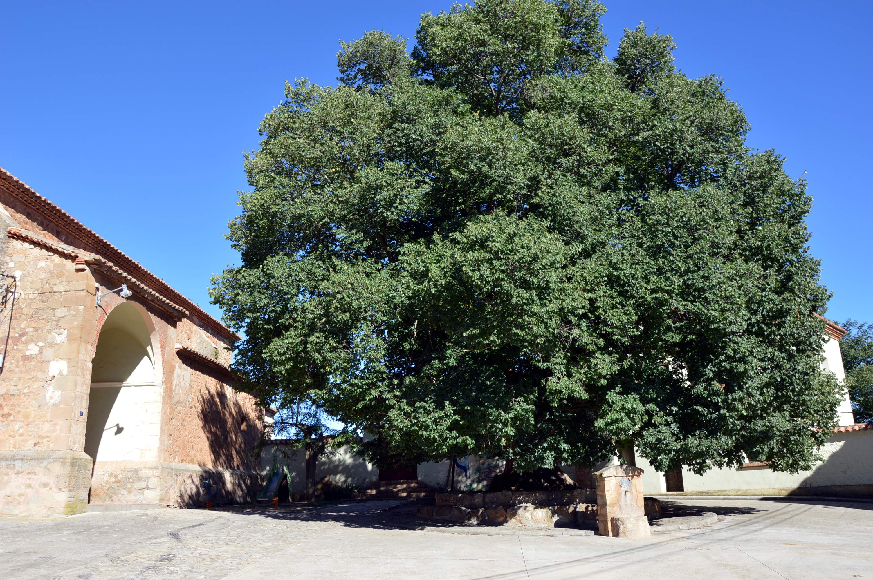 Vista del olmo común existente frente a la iglesia parroquial de San Fabián y San Sebastián, Alobras (Teruel), año 2015.